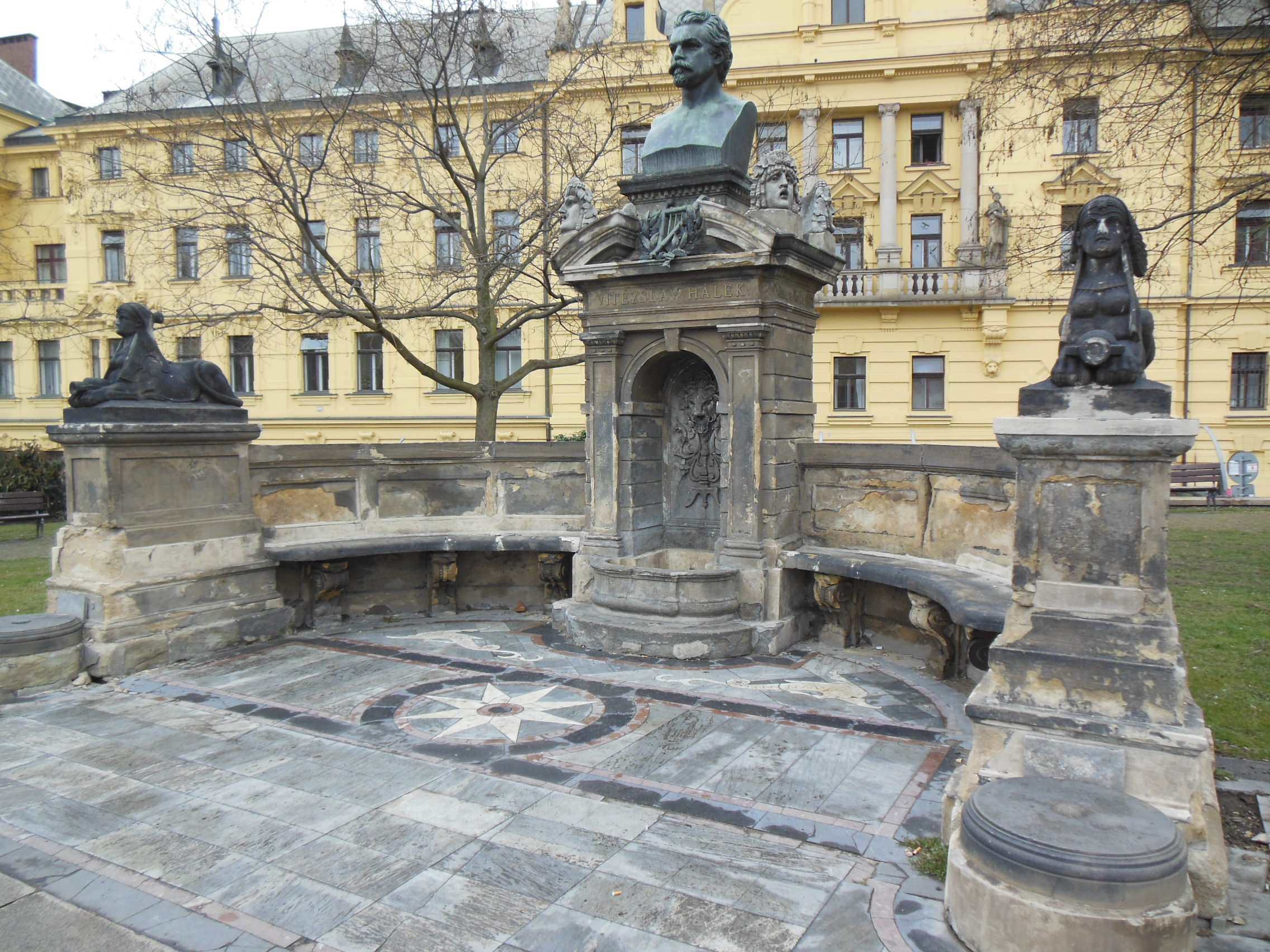 Pomník Vítězslava Hálka na Karlově náměstí v Praze.